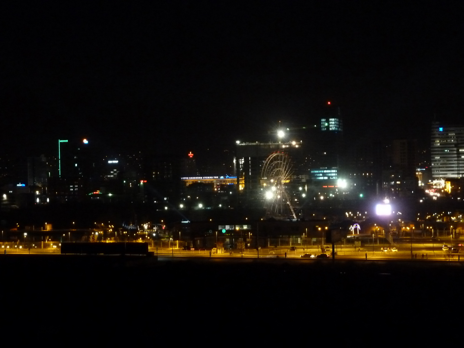 Ulánbátor éjszaka (Ulaanbaatar by night)